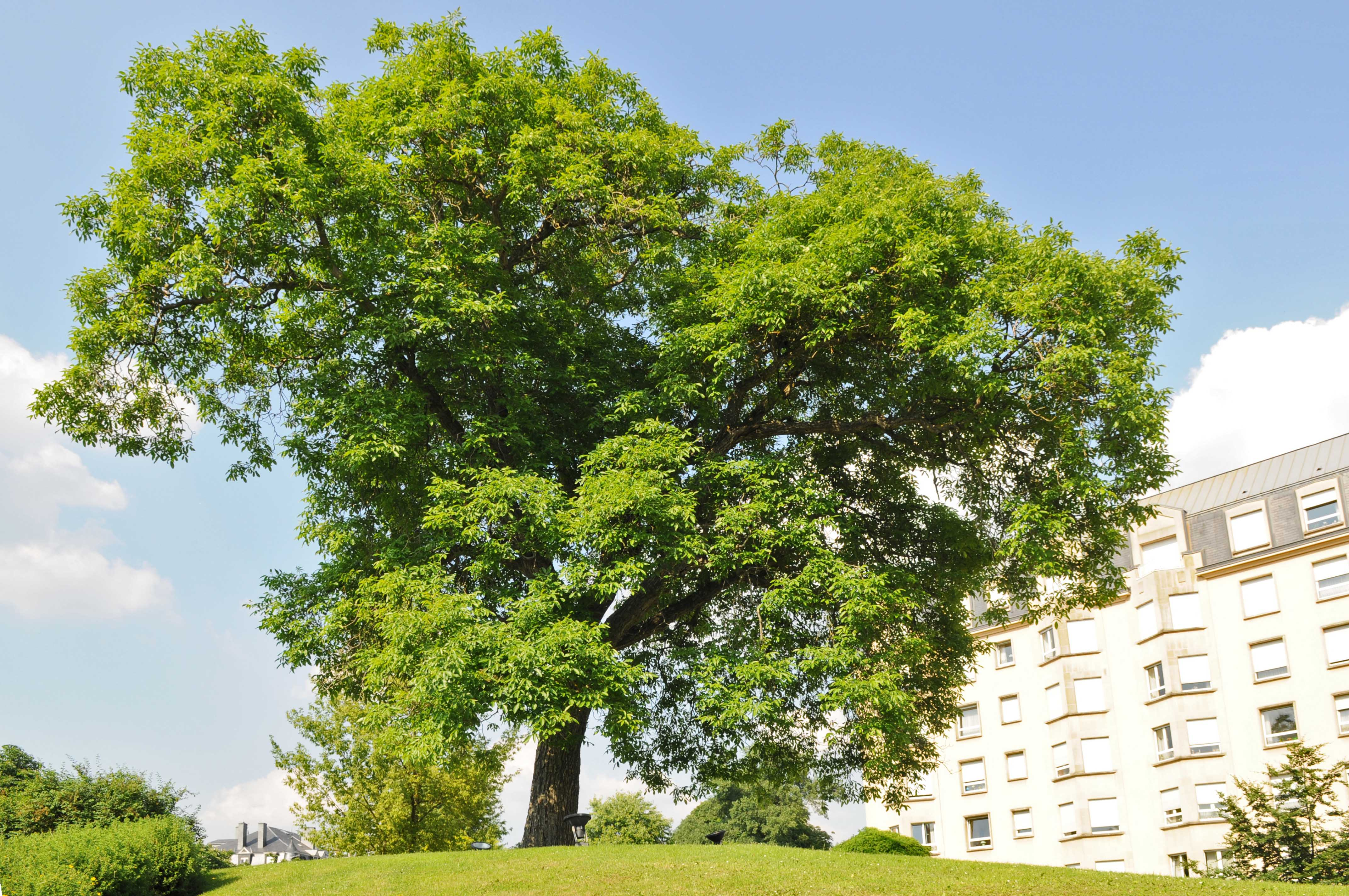 Nëssert am Konviktsgaart. Letzebuerg Nessert